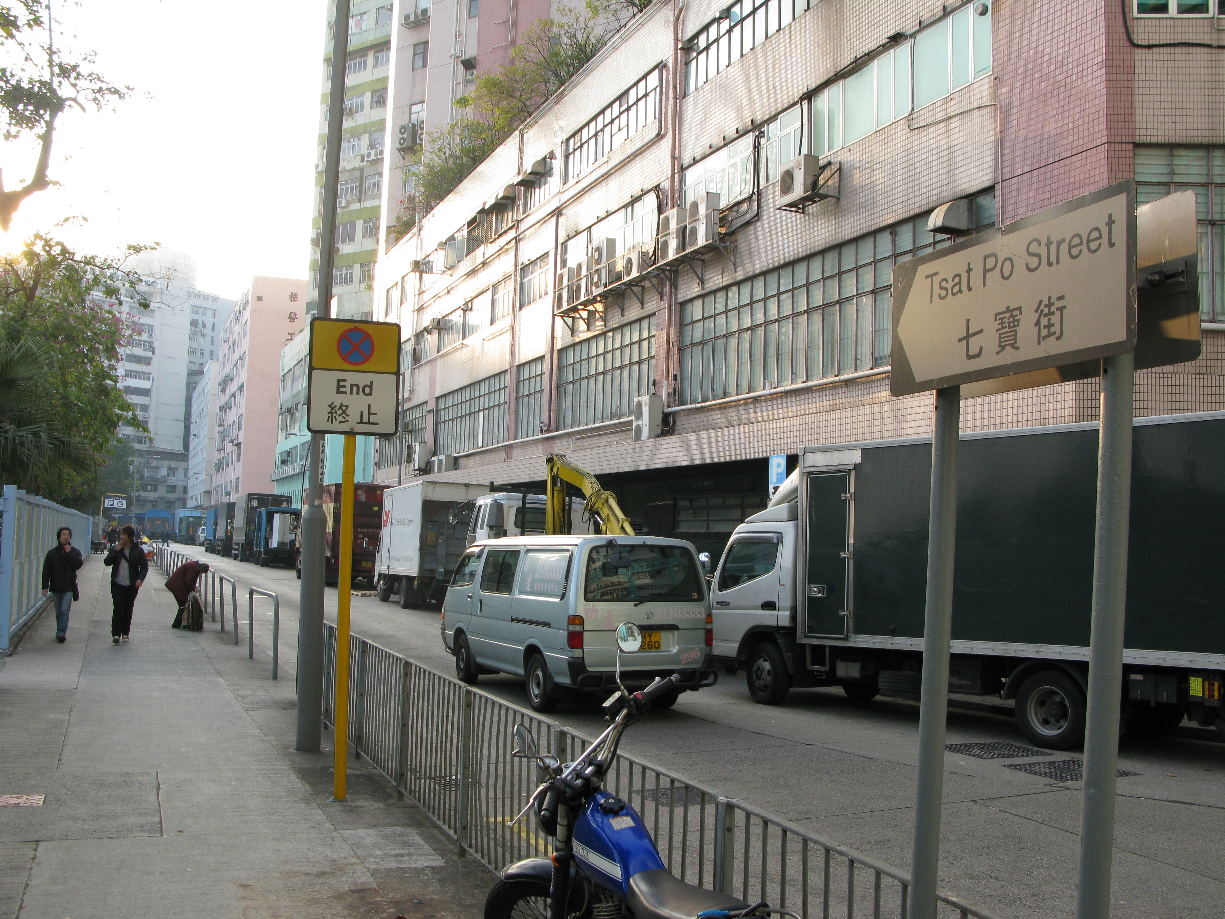 中文（香港）: 香港九龍新蒲崗七寶街